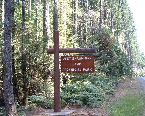 West Shawnigan Lake Provincial Park-Gate